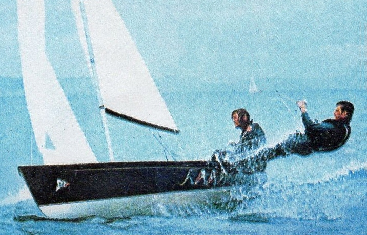 CAMPIONI dello SPORT 1973/74-Figurina n.384- PATTISSON/DAVIES -GBR -VELA-Rec